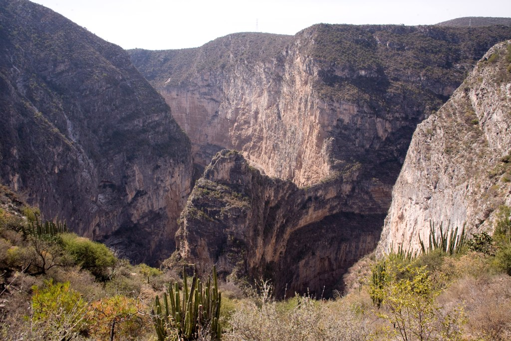 Presa Zimapan